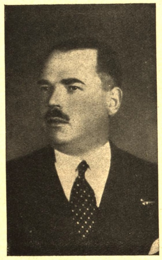 p. Adam Demidecki-Demidowicz starosta pow. wysoko-mazowieckiego. Urodzony 24.IV.1888 r. Kierownik Starostwa w Wysokiem Mazowieckiem Adam Demidecki-Demidowicz starostą powiatowym w VII st. służbowym tamże od dnia 13 lipca 1929 r. Starosta w latach 1928-1932.